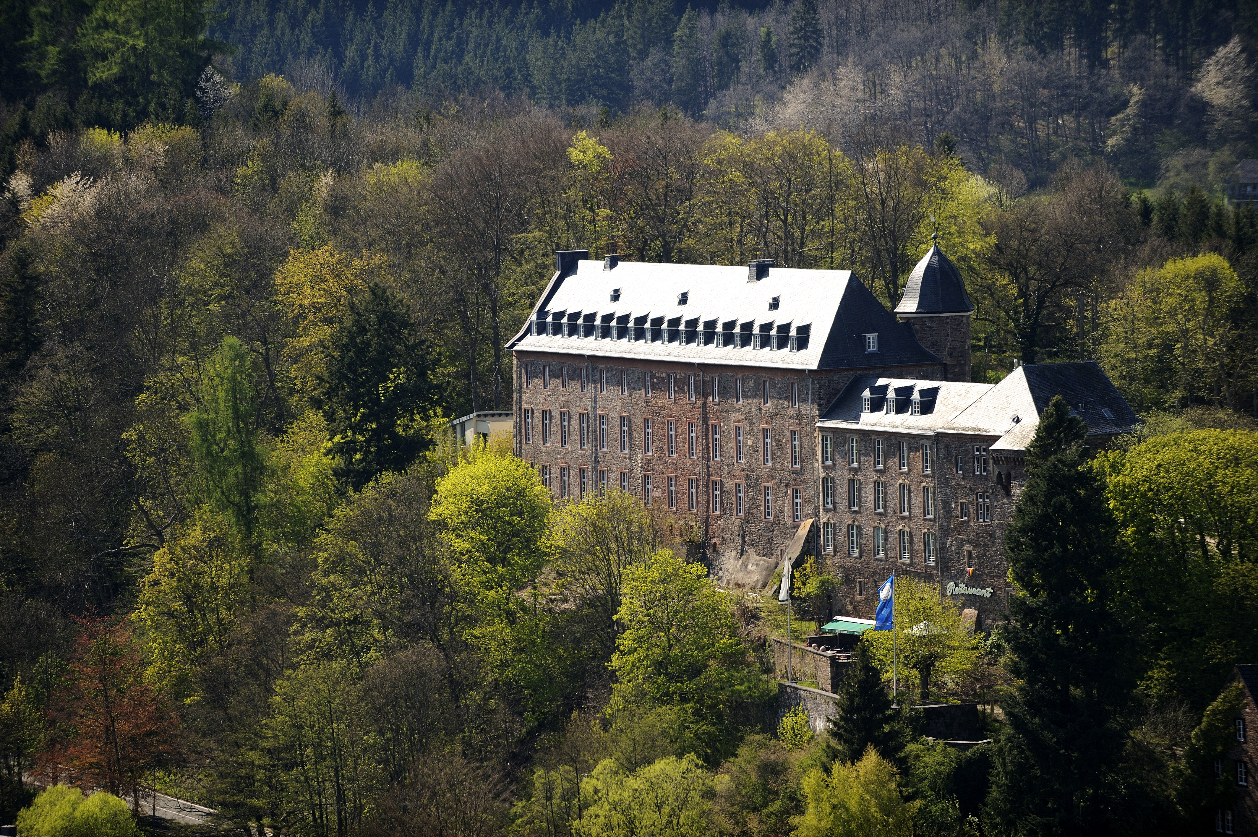 Stadtansicht Schloss Schleiden